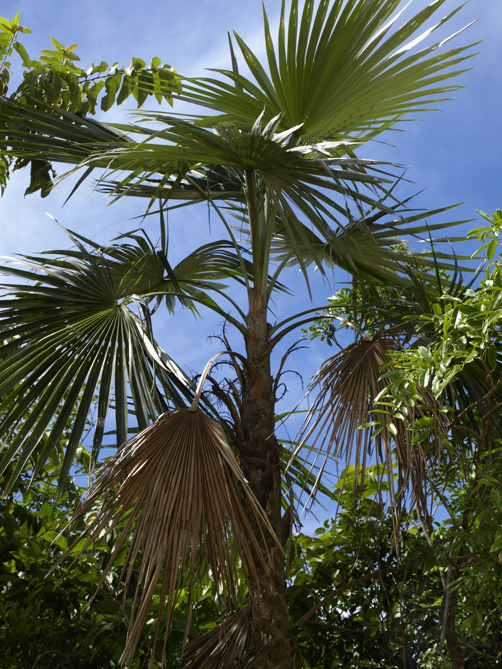 Coccothrinax argentea near Boca de Chavón, Prov. La Altagracia, Dominican Republic.